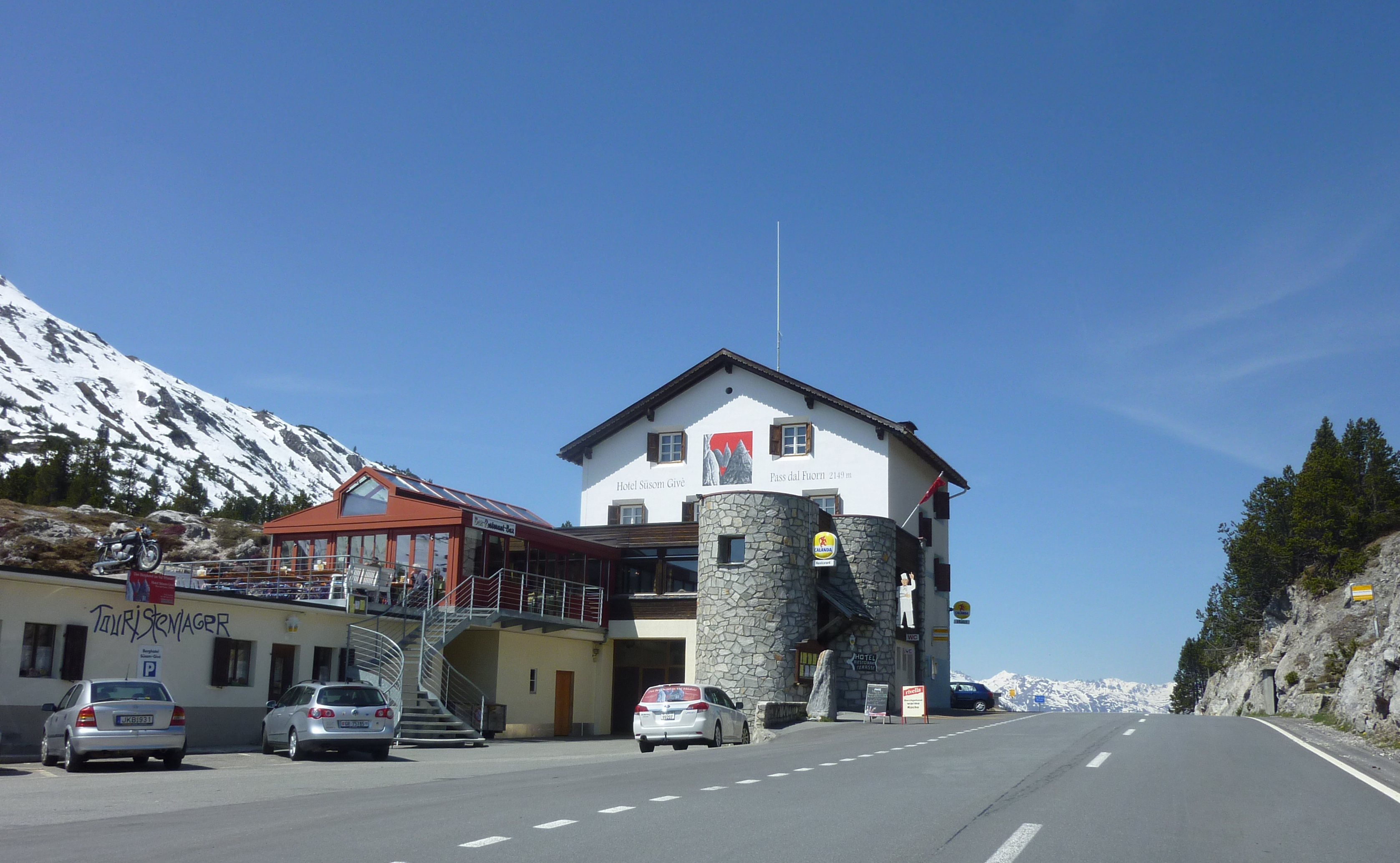 Ofenpass Ofenpass von Süden